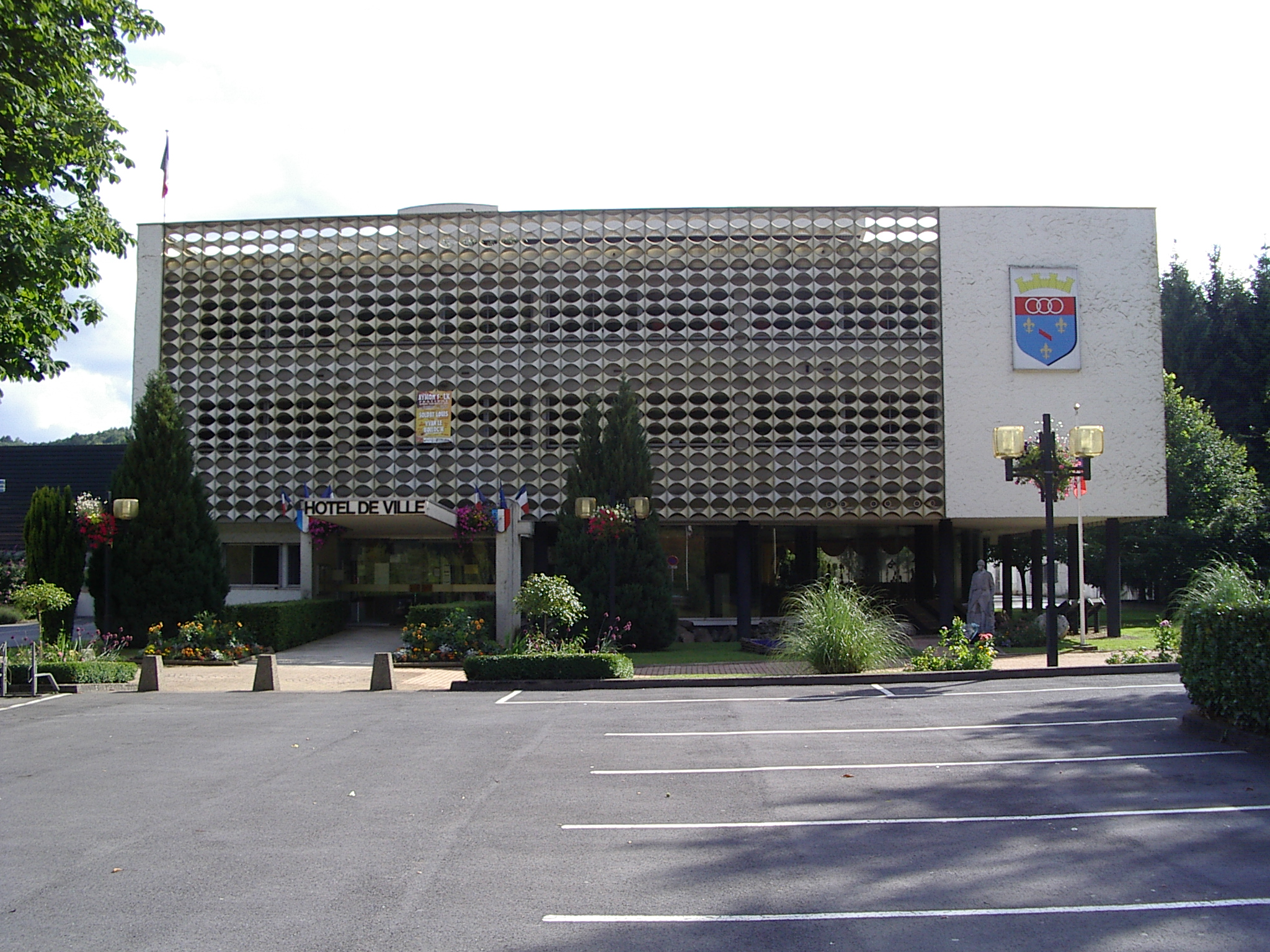 Mairie de Bogny sur Meuse, Ardennes, France